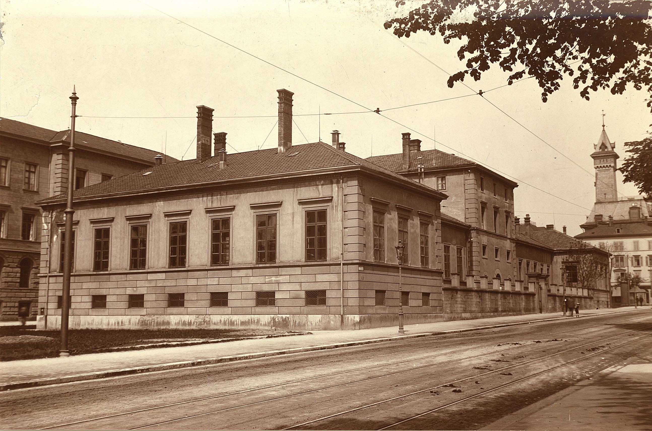 Chemiegebäude der ETH, gebaut 1886 an der Universitätsstrasse, Foto zirka 1905